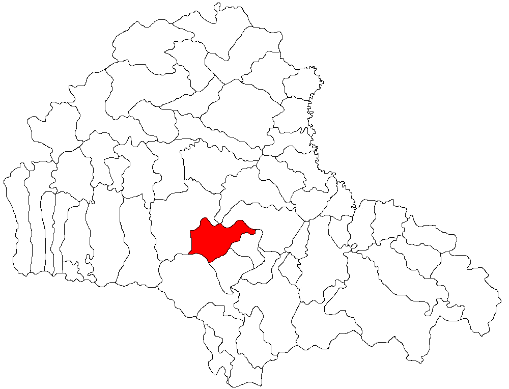 Categorie:Hărţi ale judeţului Braşov